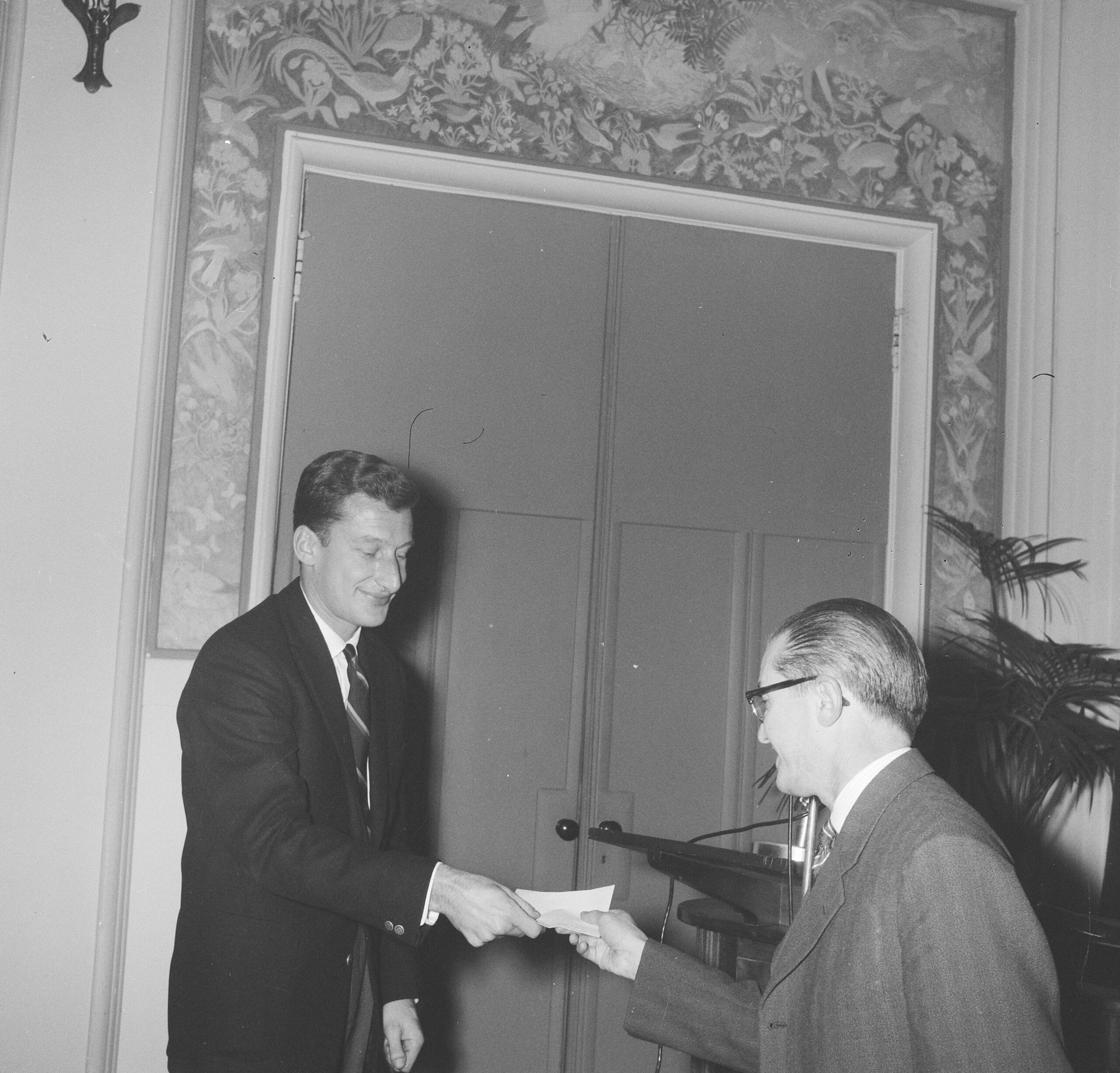 Collectie / Archief : Fotocollectie Anefo Reportage / Serie : Athos-prijs voor Harry Mulisch Beschrijving : Dr. van Lierop en Harry Mulisch (links) Datum : 7 november 1961 Trefwoorden : prijzen Persoonsnaam : Mulisch, Harry Fotograaf : Nijs, Jac. de / Anefo Auteursrechthebbende : Nationaal Archief Materiaalsoort : Negatief (zwart/wit) Nummer archiefinventaris : bekijk toegang 2.24.01.03 Bestanddeelnummer : 913-1575